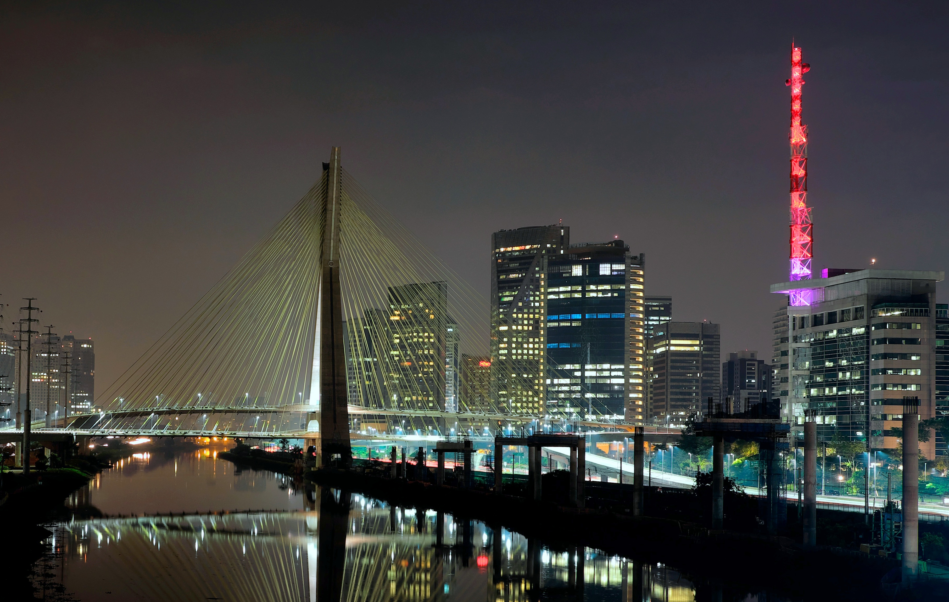 Ponte Estaiada na Marginal Pinheiros, em São Paulo